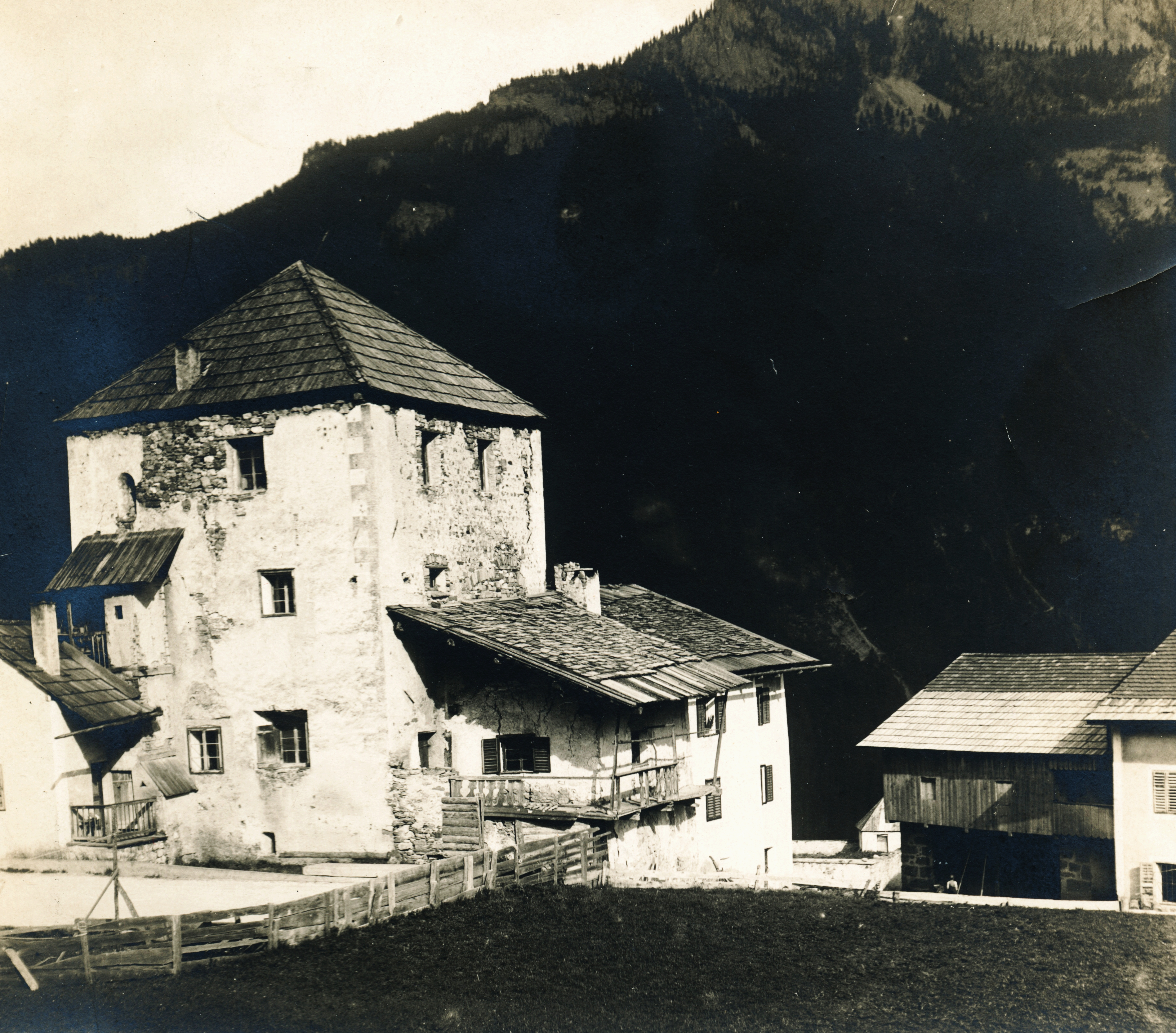 Location: Italy, Vigo di Fassa